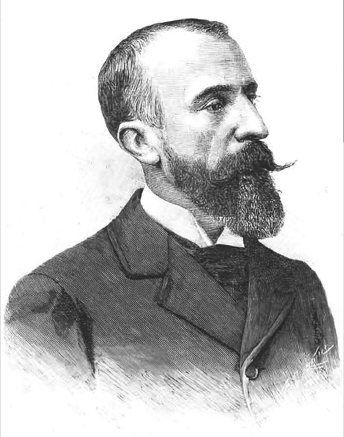 Retrato del arquitecto español Enrique María Repullés y Vargas (1845-1922)